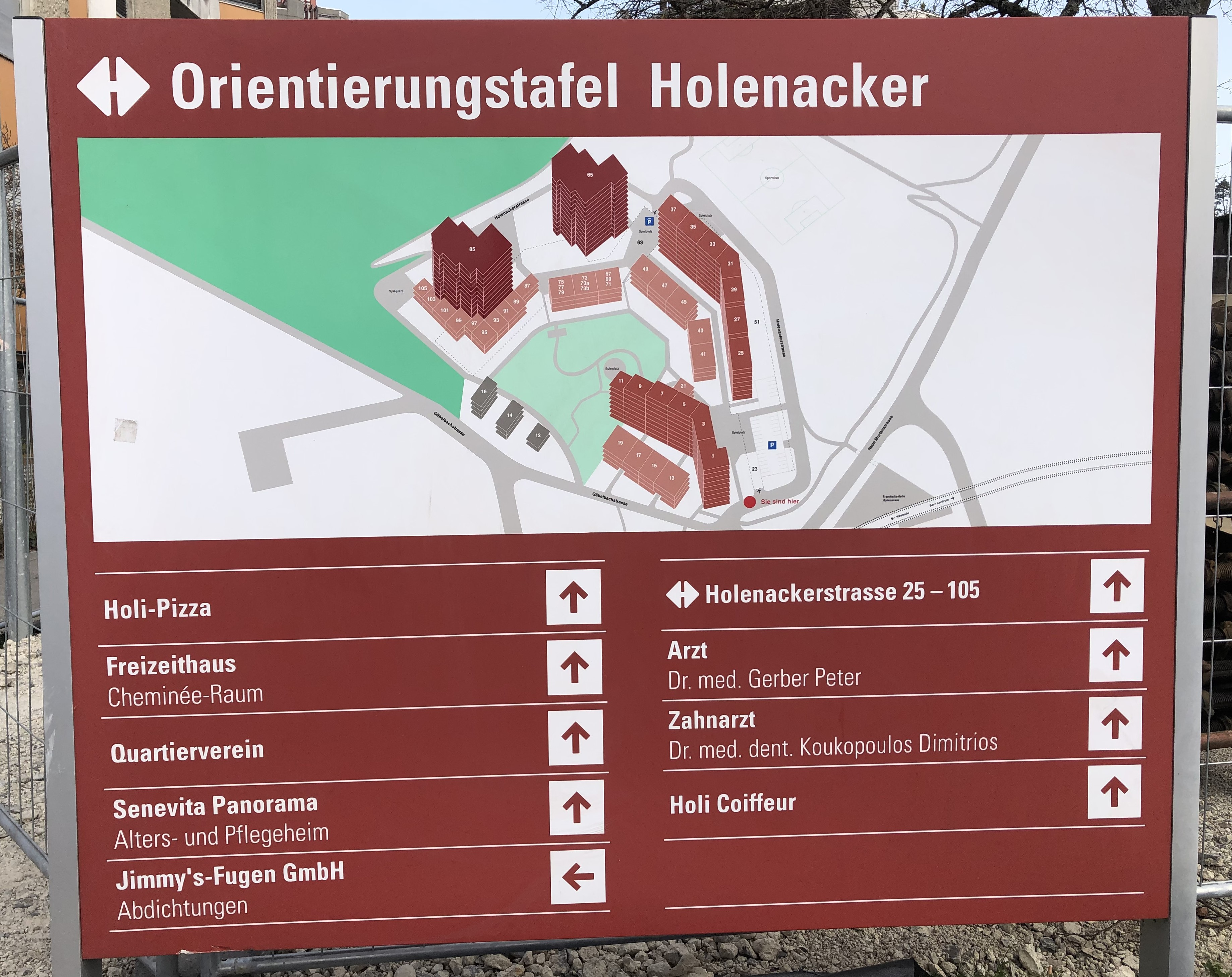 Holenacker Übersichtstafel